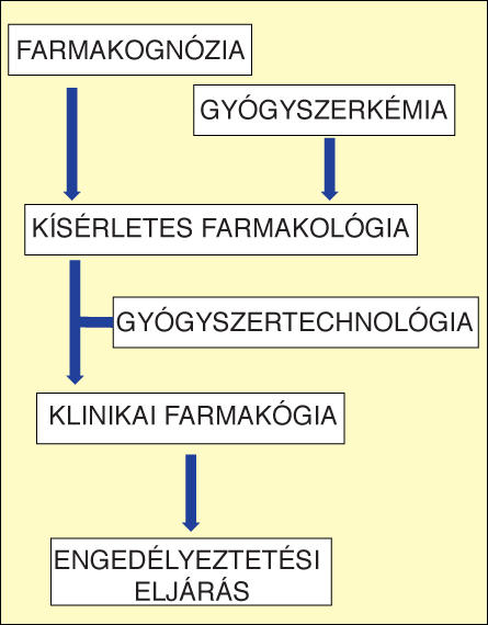 Rajz, gyógyszerfejlesztés folyamatábra, boxok, nyilak